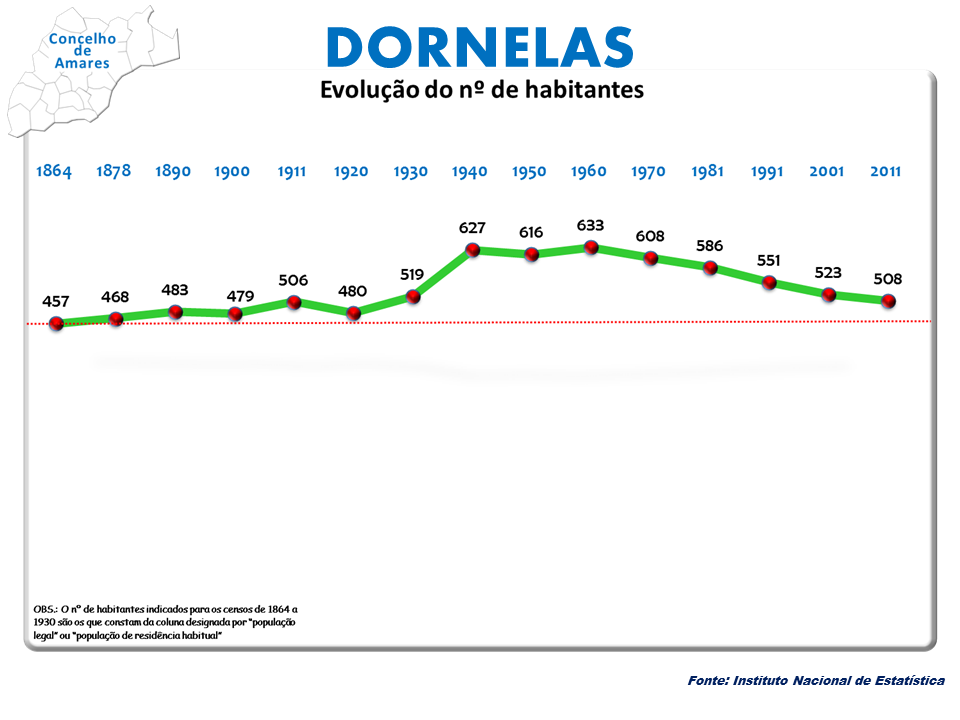 Censo 2011